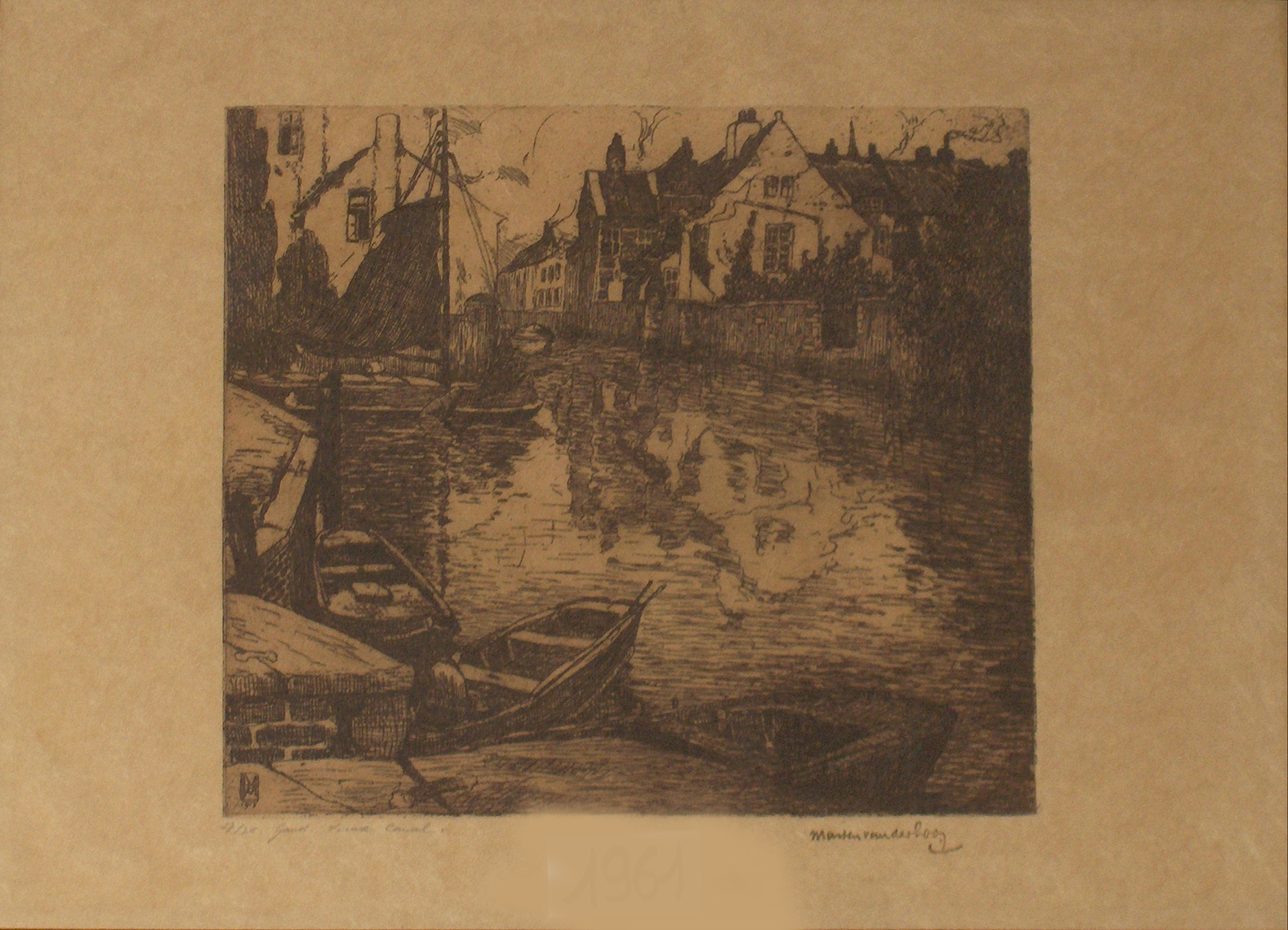 "Gand-Vieux canal" (1915), ets door Marten Van der Loo (1880-1920)